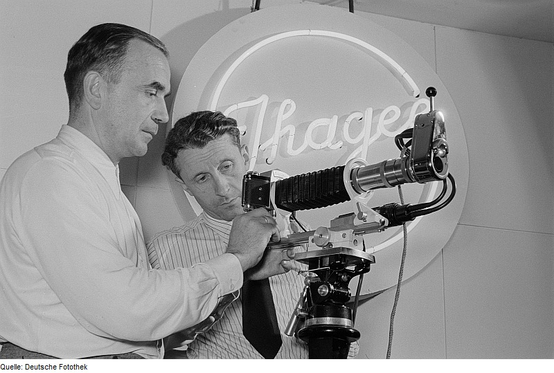 Original image description from the Deutsche Fotothek Zwei Personen an einer Kleinbildkamera Exakta der Ihagee Dresden mit Balgengerät auf der Leipziger Herbstmesse 1954